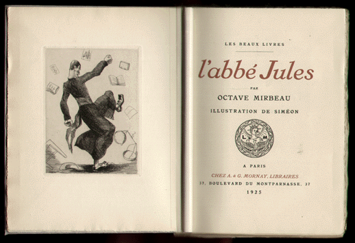 L'Abbé Jules, roman d'Octave Mirbeau (1848-1917), illustré par Fernand Siméon (1884-1928). Éditions Mornay, 1925.